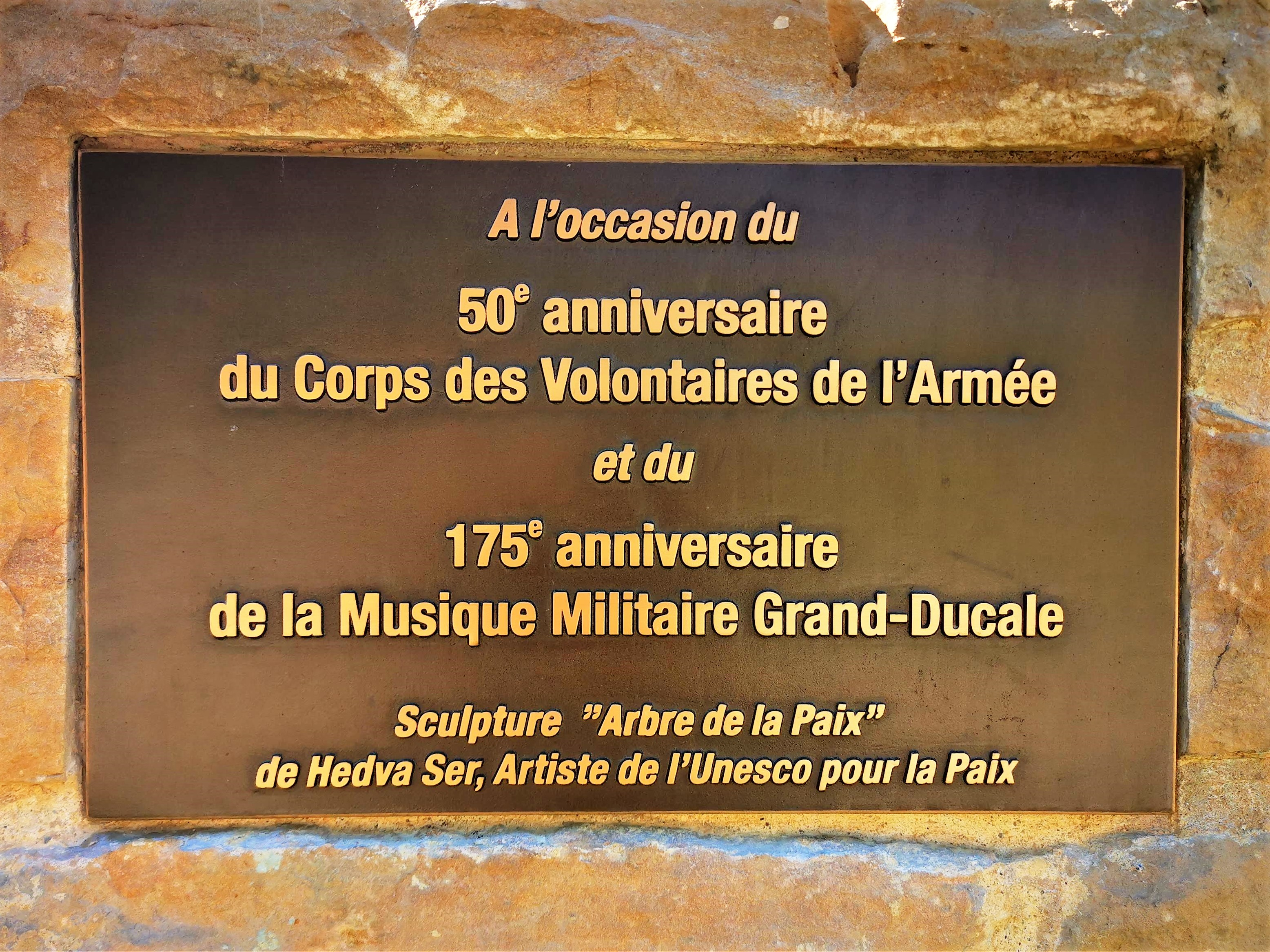 Luxembourg. Plaque commémorative de la sculpture "Arbre de la paix" de Hedva Ser, inaugurée en 2019.